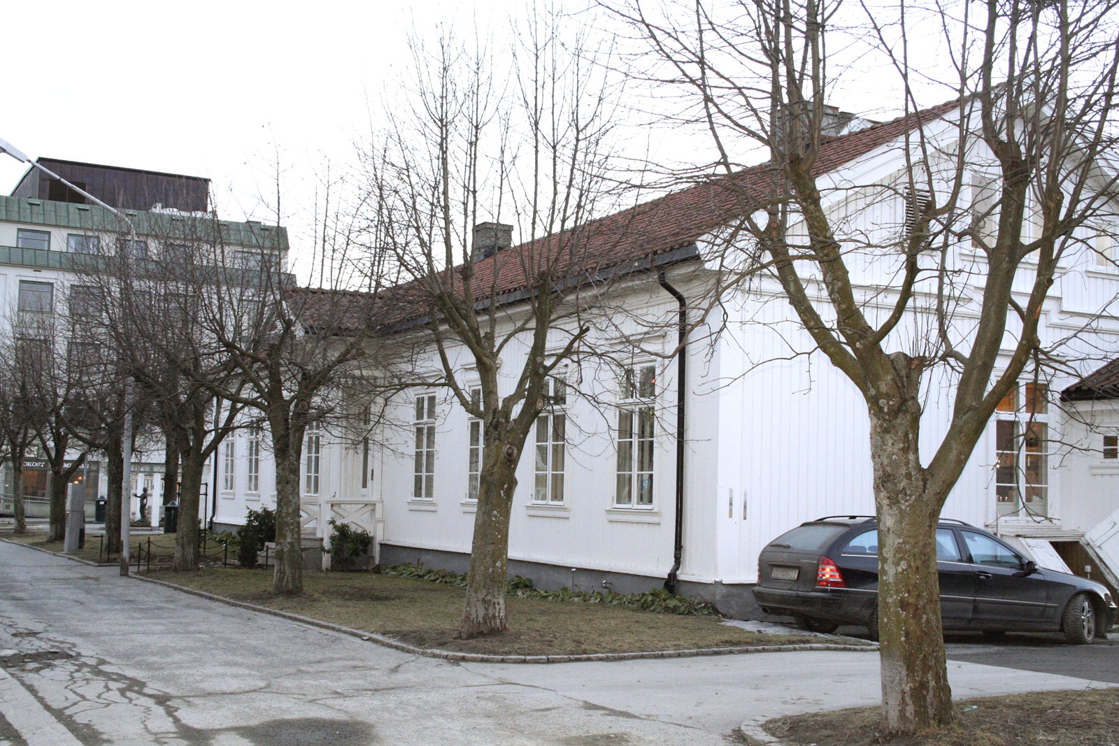 Hønefoss hjelpefengsel, fasade mot nordøst